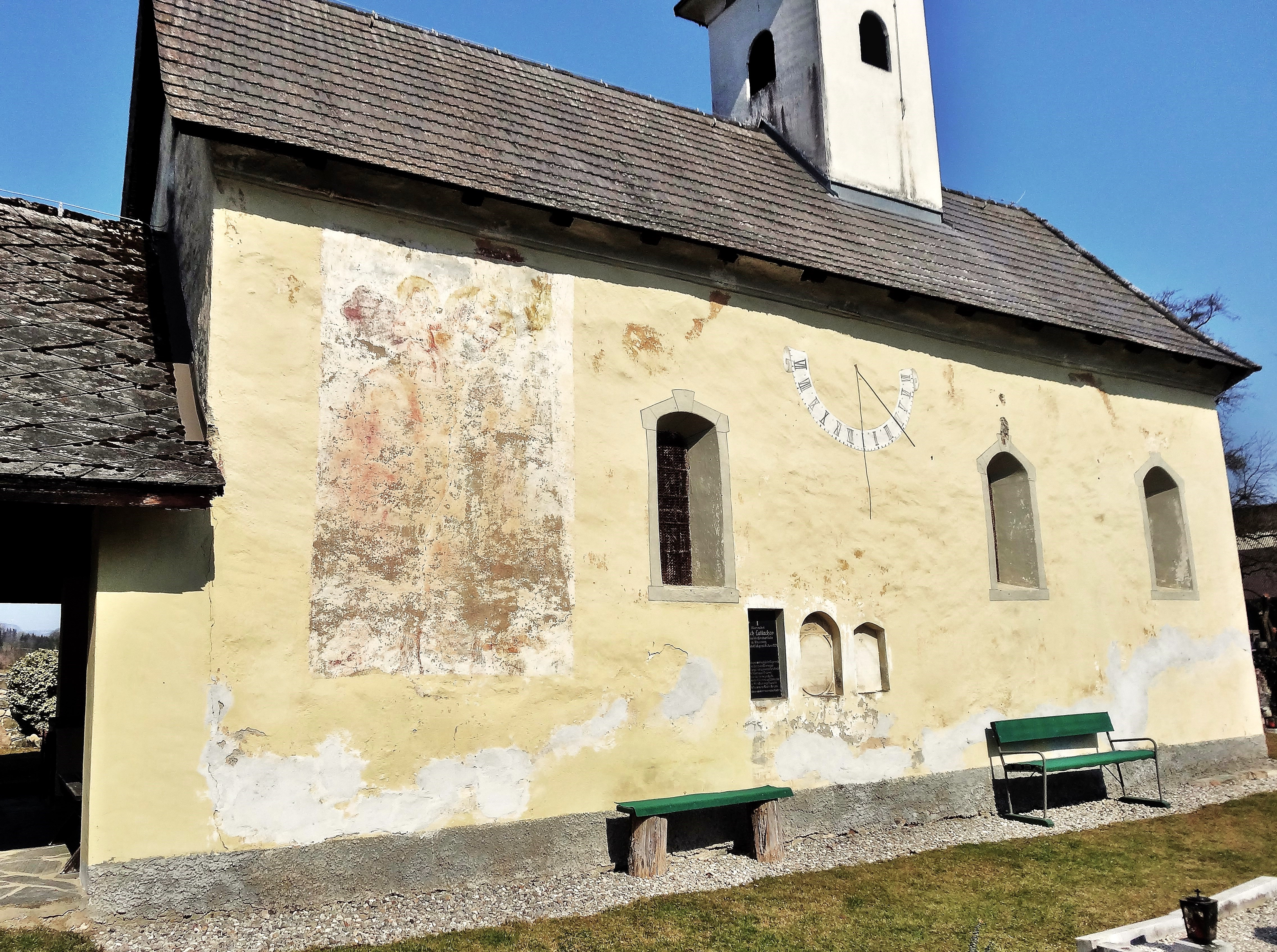 Kath. Filialkirche Heilige Andreas und Nikolaus in Knasweg (Moosburg), Südfassade